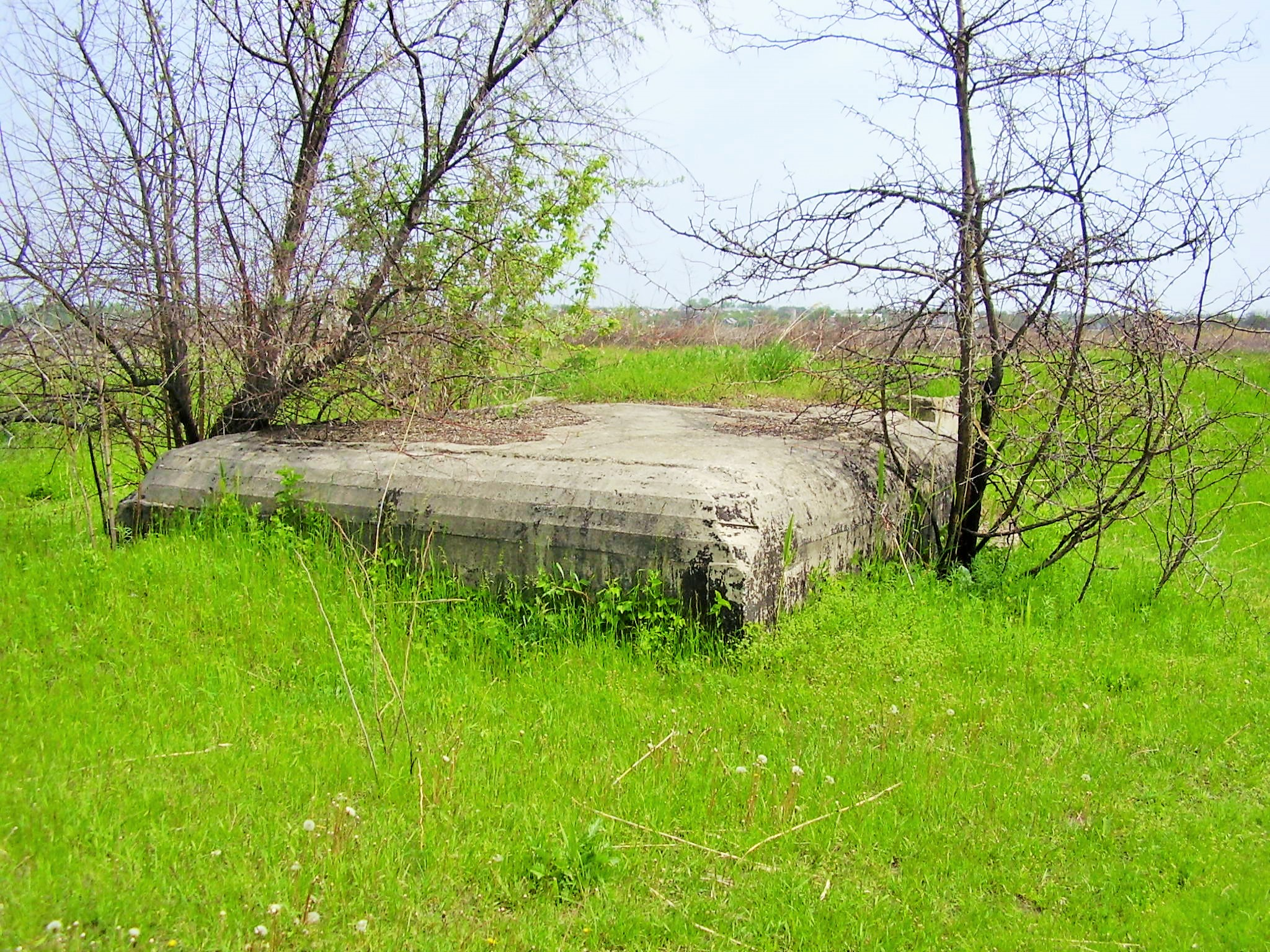 Дот у с. Парканы